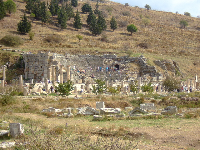 Ephesos: Odeon